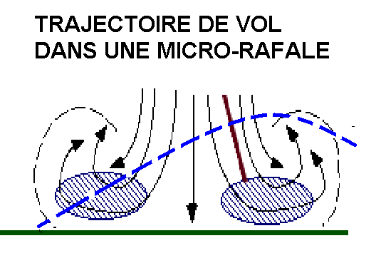 La ligne pointillée montre la trajectoire d'un avion passant en descente à travers une micro-rafale (voir rafale descendante). L'avion venant de droite rencontre soudain la rafale ce qui augmente sa portance et le fait remonter. Rendu de l'autre côté de la zone de rafale, le vent est devenu d'arrière et il pique du nez.